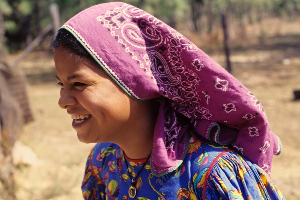 mujer huichol, jalisco